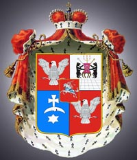 Герб рода князей Куракиных